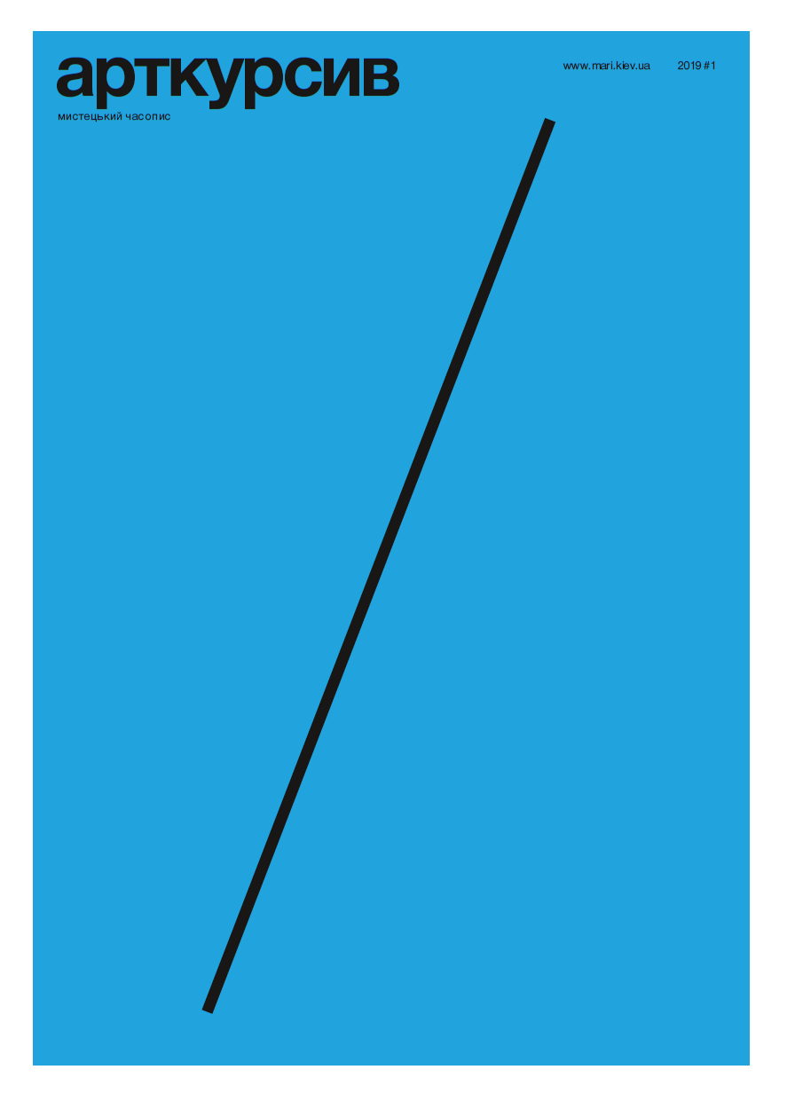 Мистецький часопис "Арткурсив"